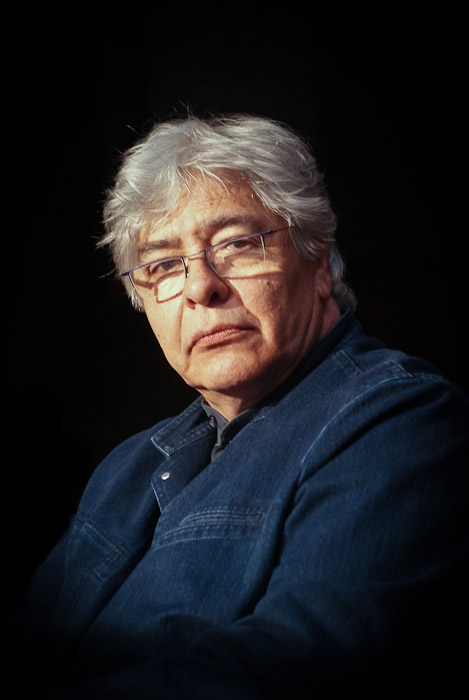 Enrique Carbajal - Sebastián